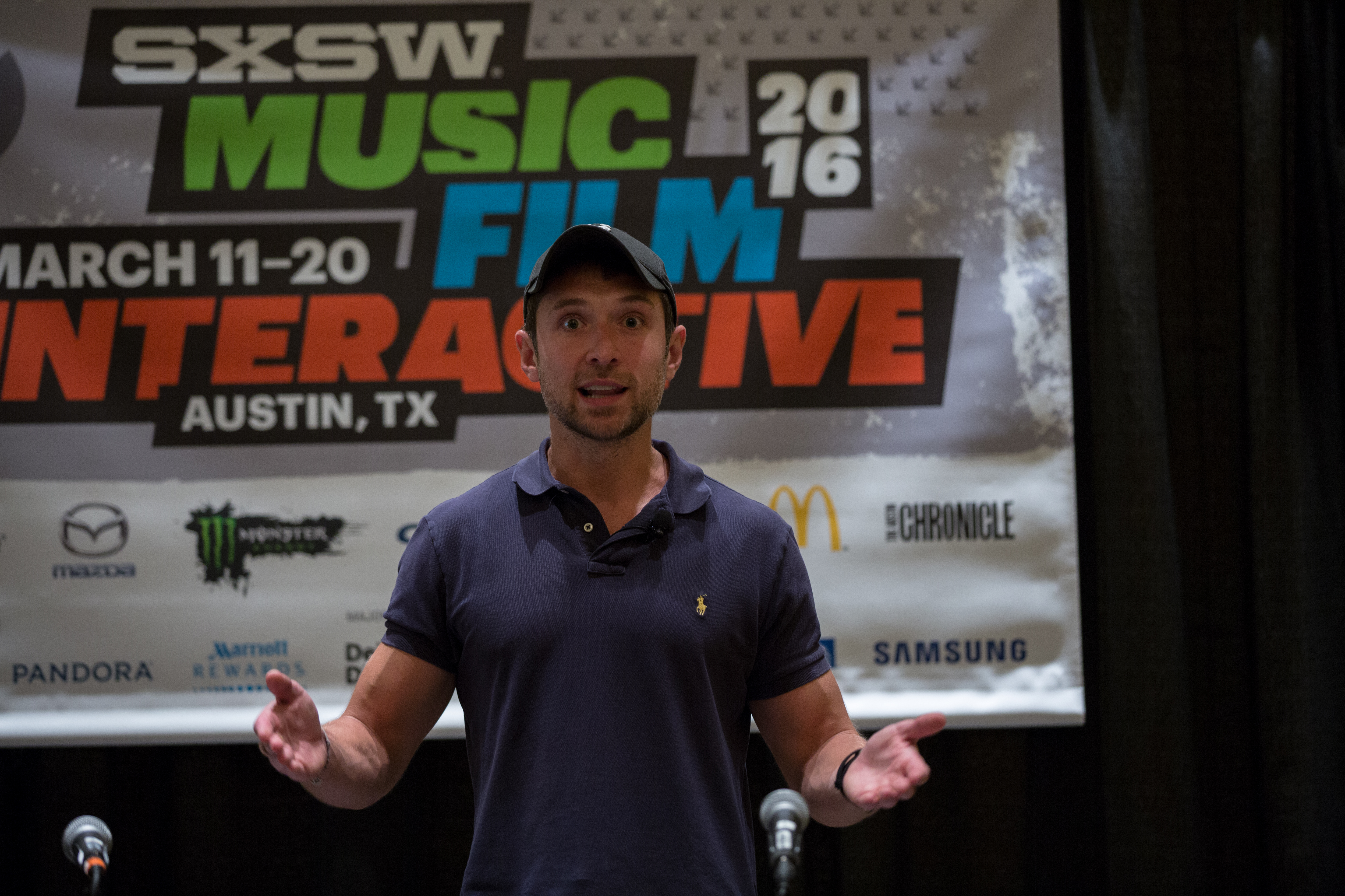 Ben Lerer. Photo: Ståle Grut / NRKbeta